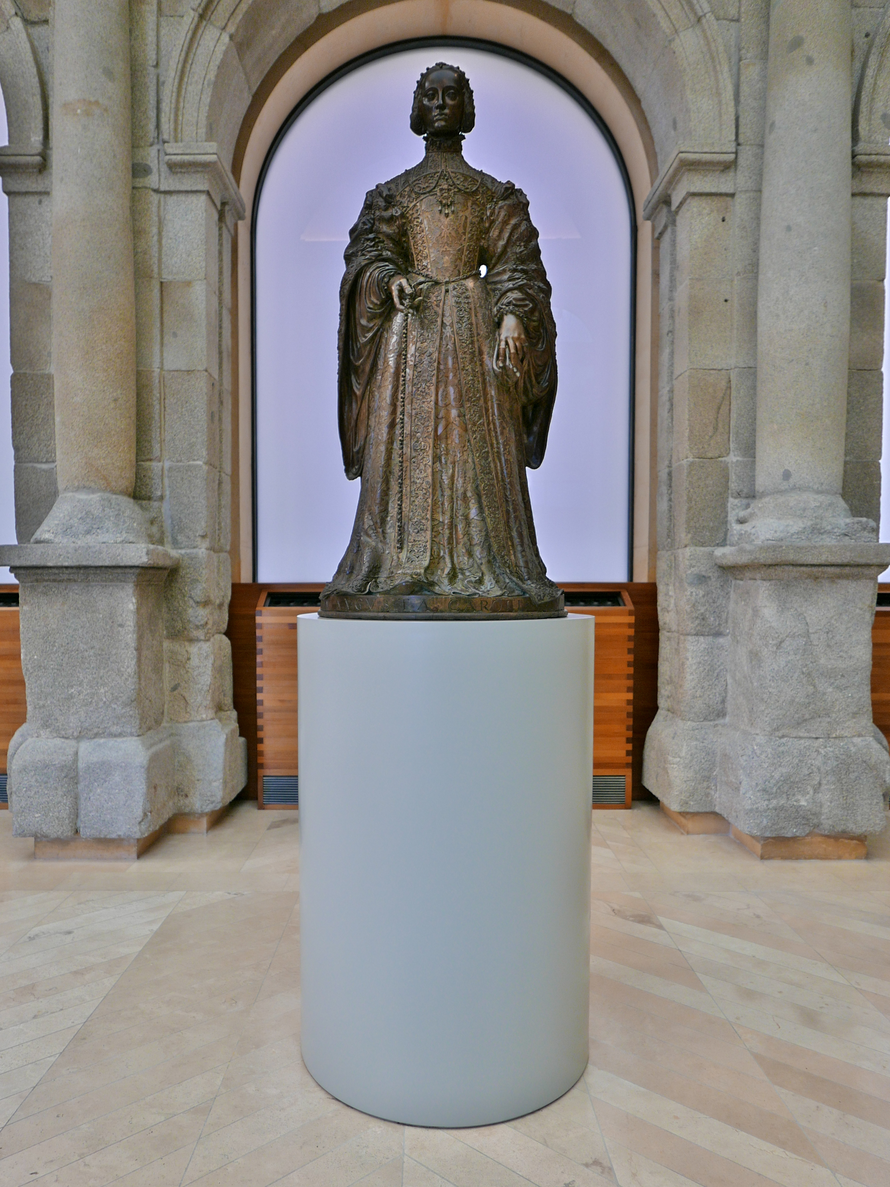 Escultura en bronce de León y Pompeo Leoni (1564) de Isabel de Portugal.